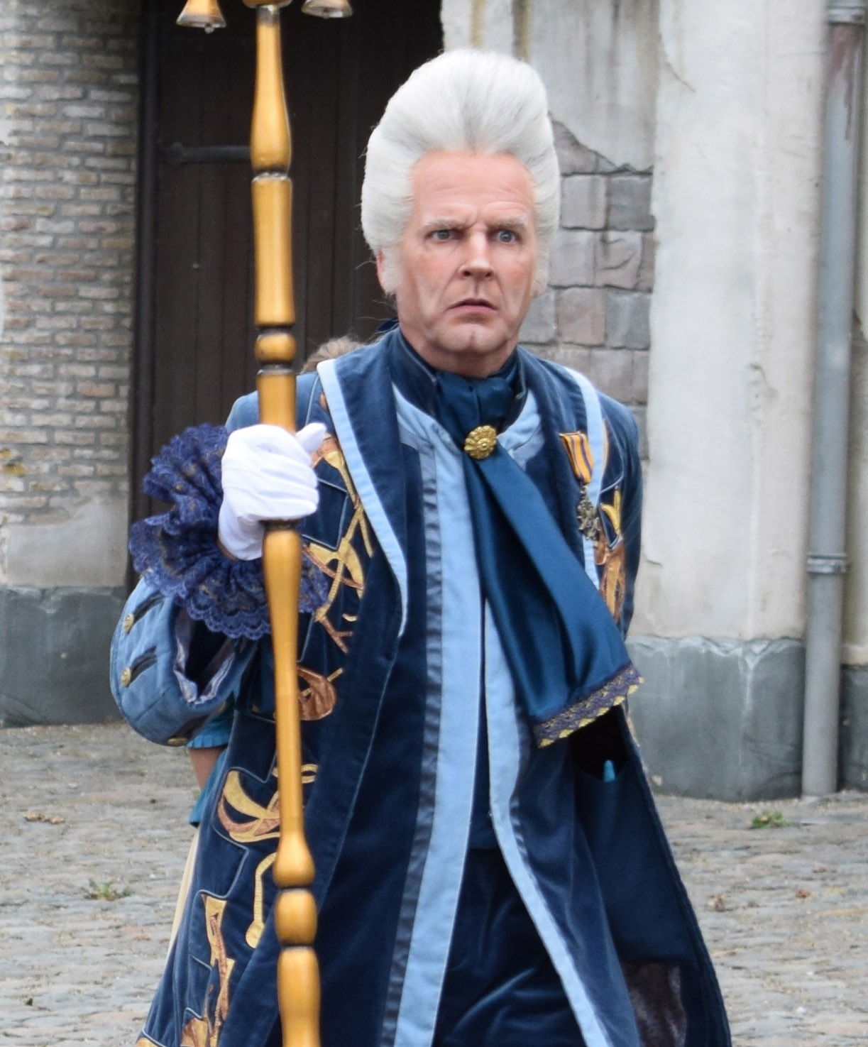 O.J. Punctuel in de Efteling